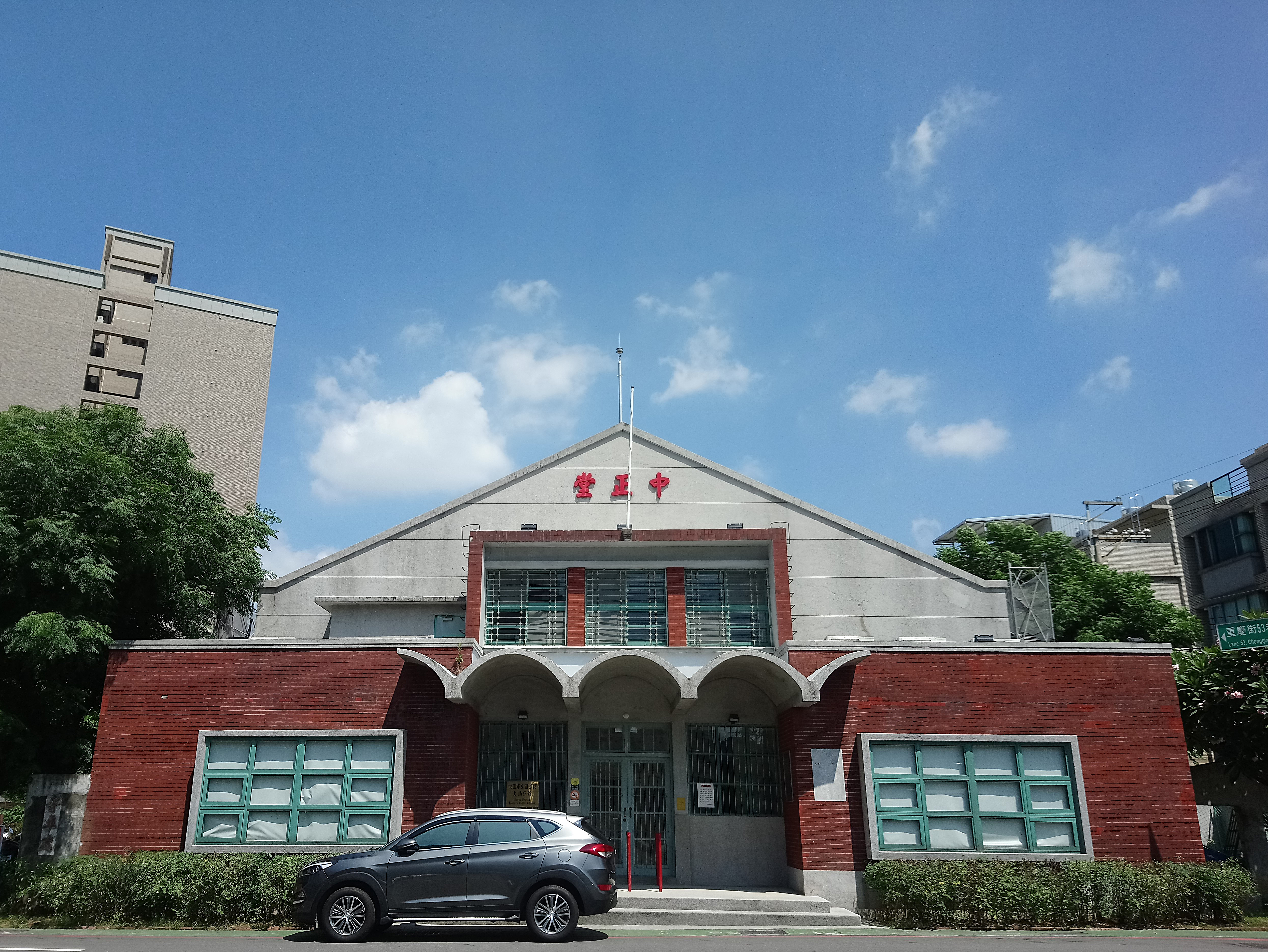 八德中正堂,桃園市八德區大愛里